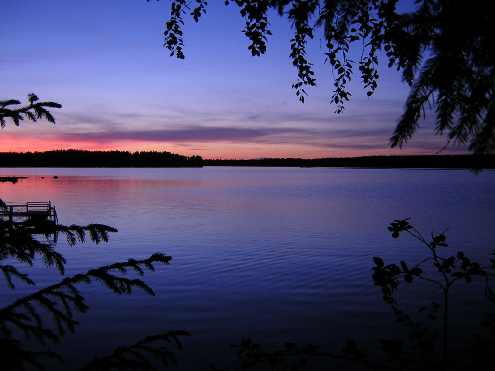 Ähtärinjärvi kesäyönä